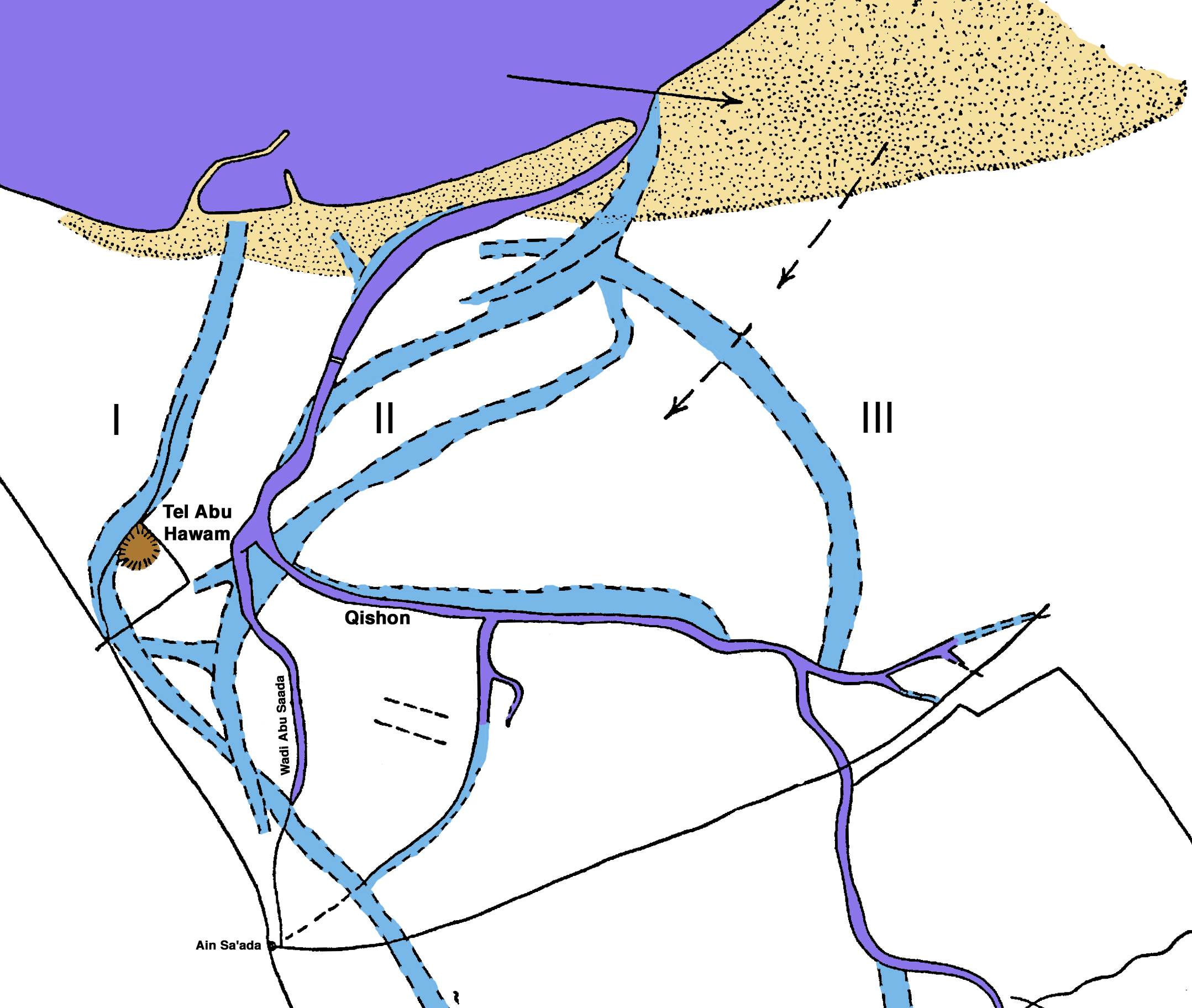 Tell Abu Hawam Excavation 2001 by Haifa University Israel. The head of the expedition was Professor Michal Artzy. משלחת חפירות ארכאולוגיות בתל אבו הואם שהתקיימה בשנת 2001 ע"י אוניברסיטת חיפה , החוג לציוויליזציות ימיות בראשות פרופ' מיכל ארצי. התל נמצא במפרץ חיפה והיה עיר נמל עתיקה באזור המפרץ מתקופת הברונזה המאוחרת ועד התקופה ההליניסטית This work is free and may be used by anyone for any purpose. If you wish to use this content, you do not need to request permission as long as you follow any licensing requirements mentioned on this page.